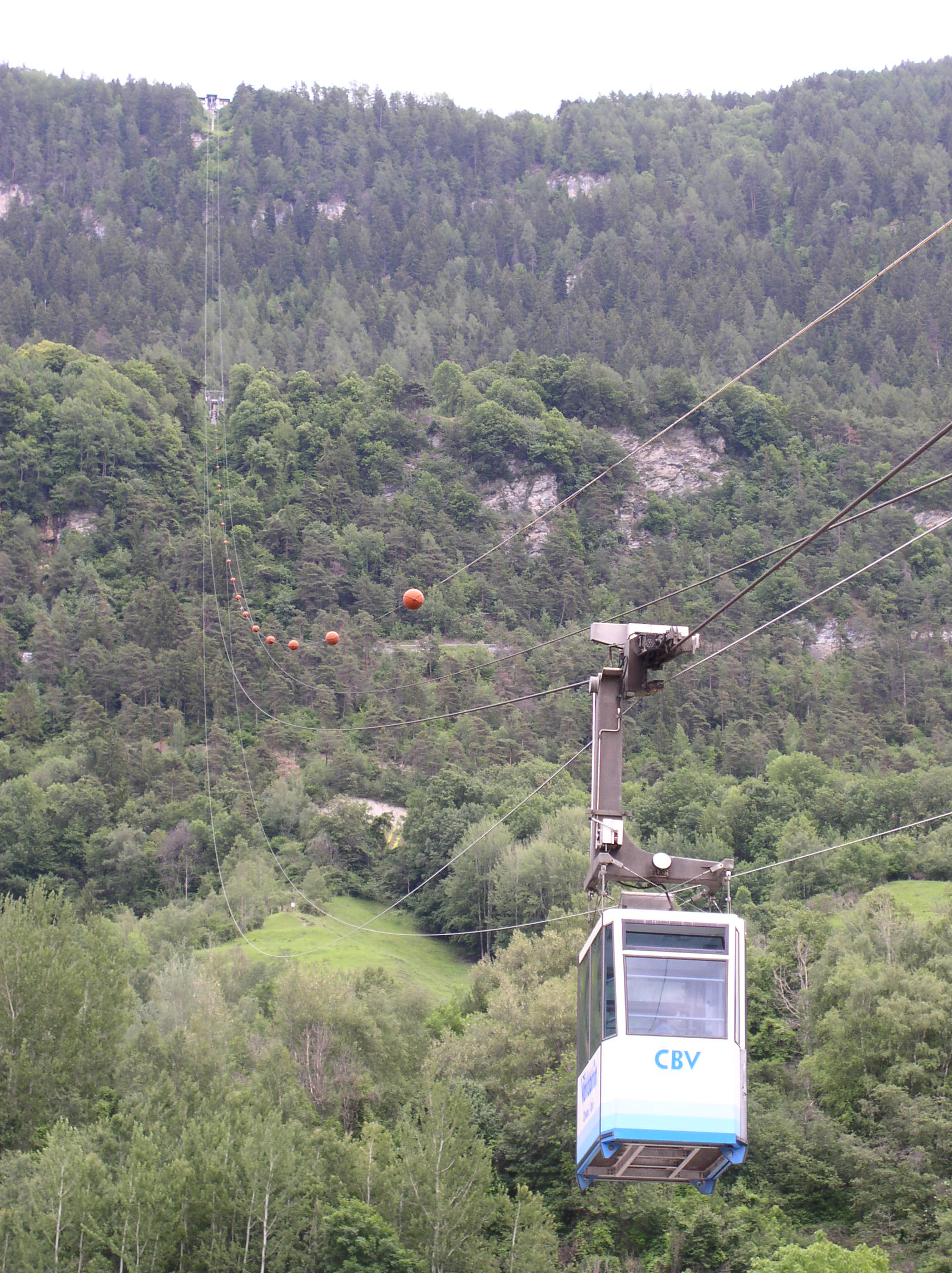 Téléphèrique Chalais Briey Vercorin, Valais, Switzerland